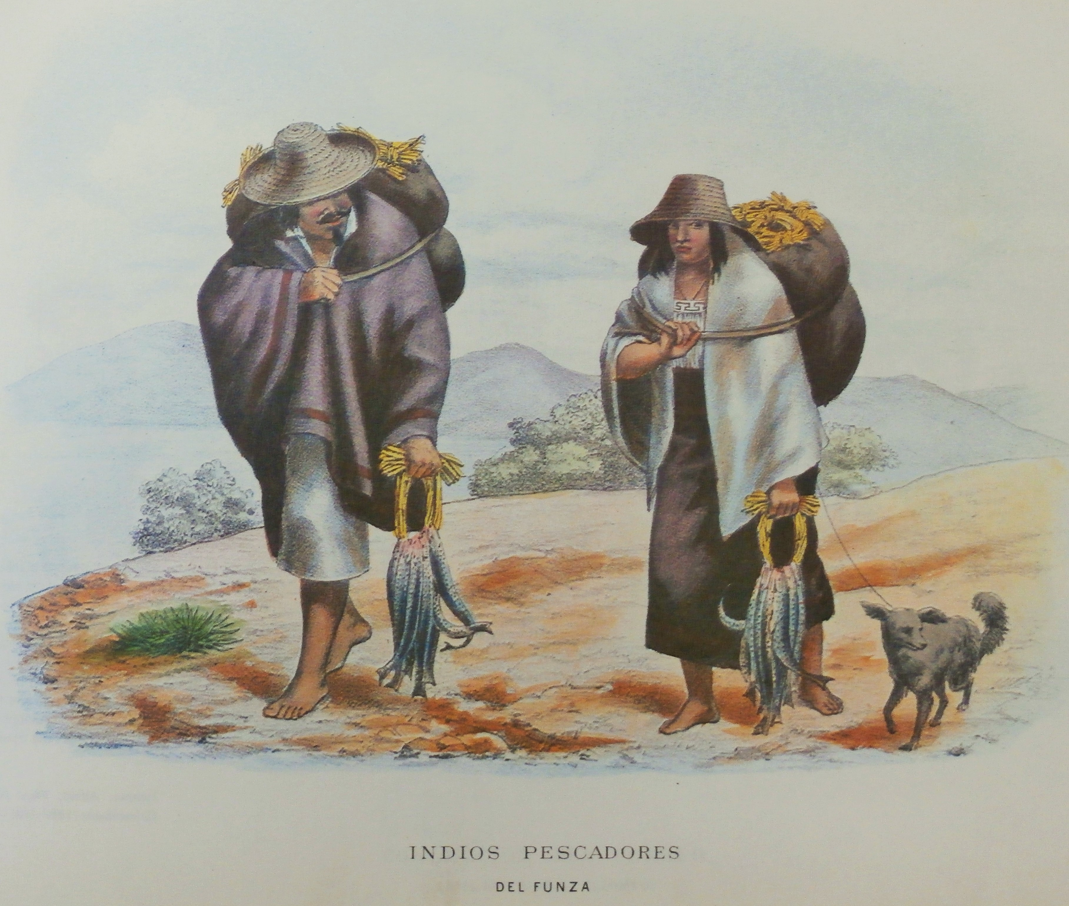 Litografía del artista colombiano Ramón Torres Méndez